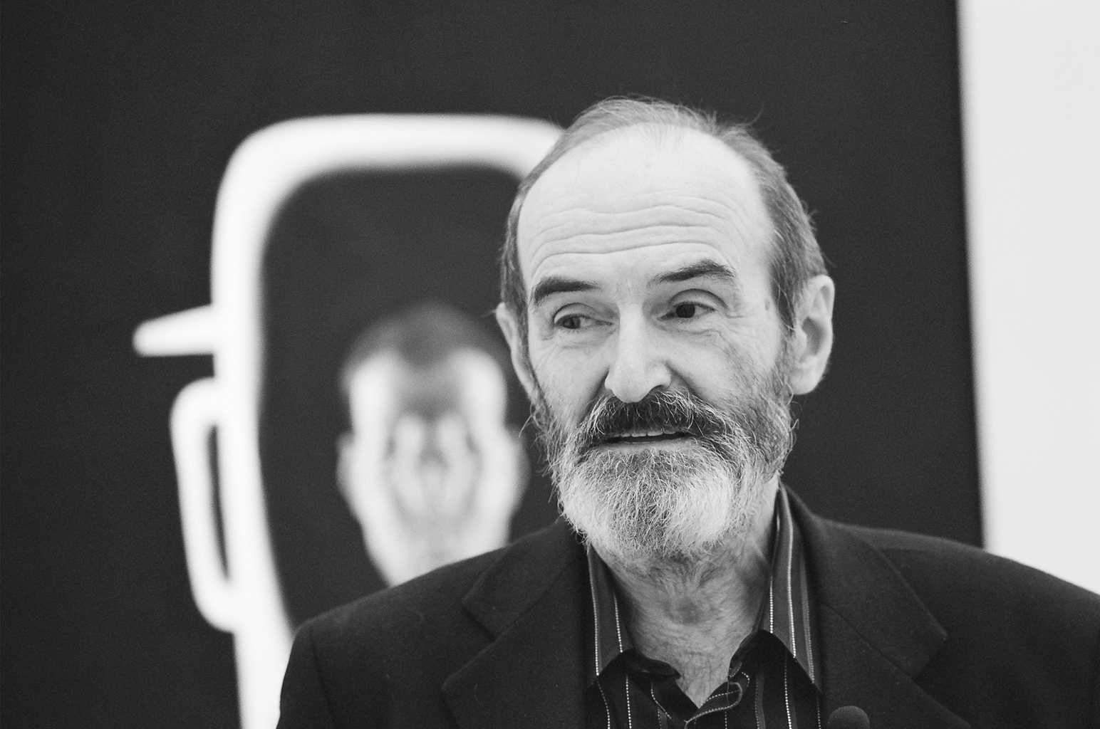 Фотография для телепрограммы, на своей выставке-ретроспективе в Третьяковской Галерее